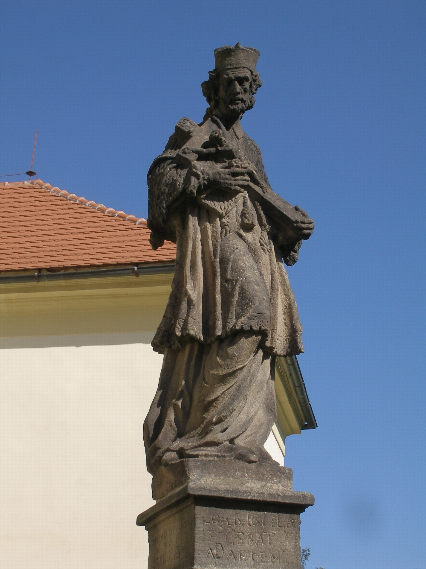 Socha sv Jana Nepomuckého, Nové Strašecí, okres Rakovník